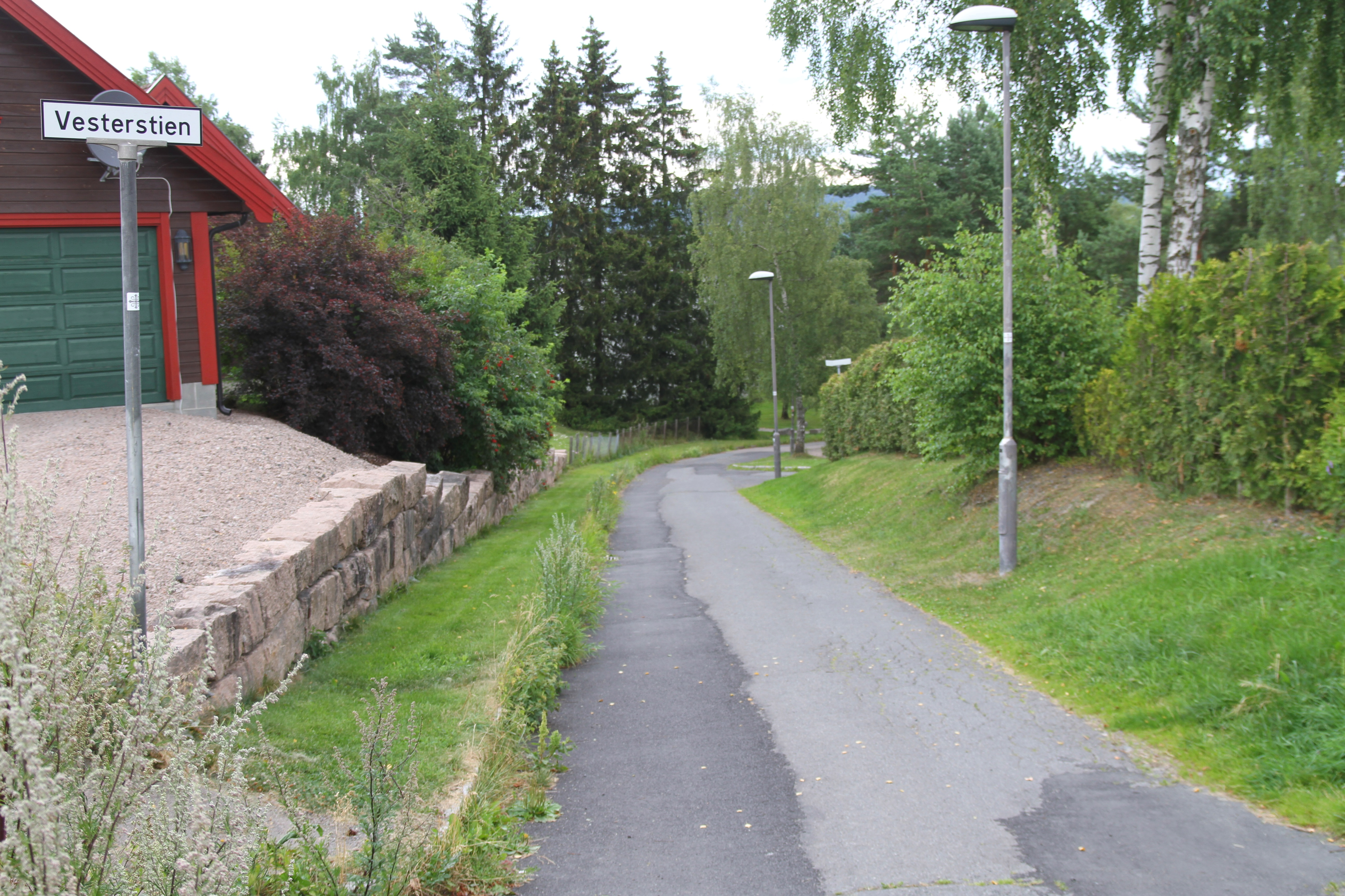 Vesterstien i Oslo.